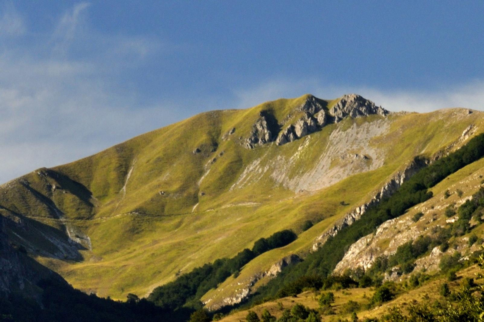 Vista della vetta del Monte Pozzoni dalla Valle Falacrina del comune di Cittareale